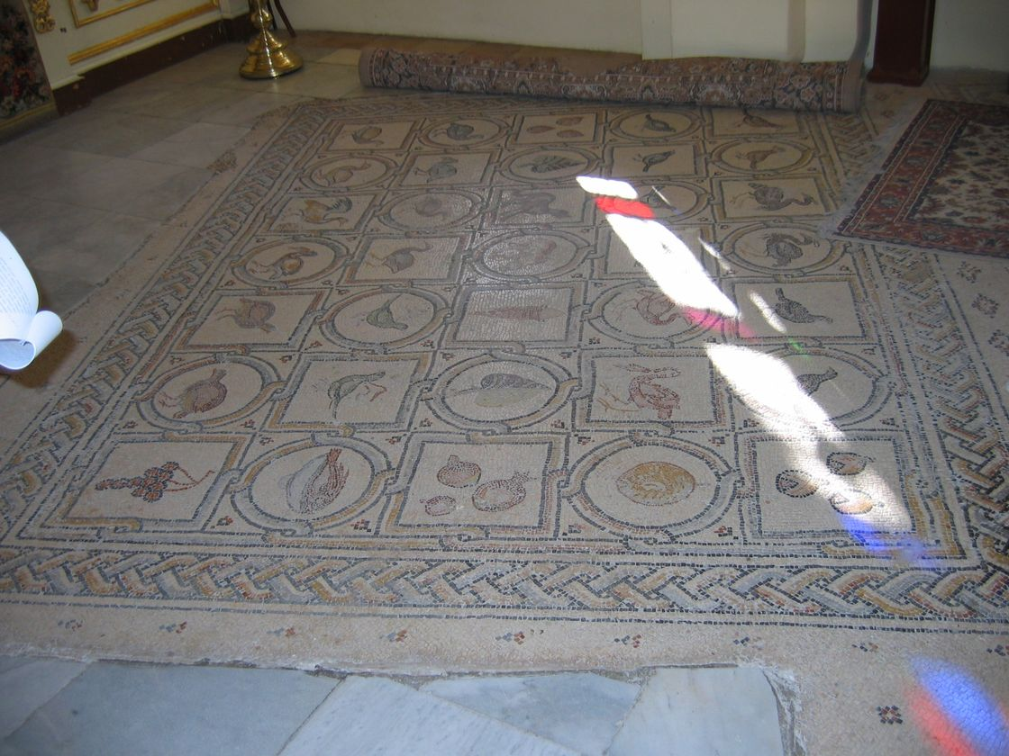 הפסיפס הארמני בקפלת המנזר בכנסיית העלייה הרוסית.